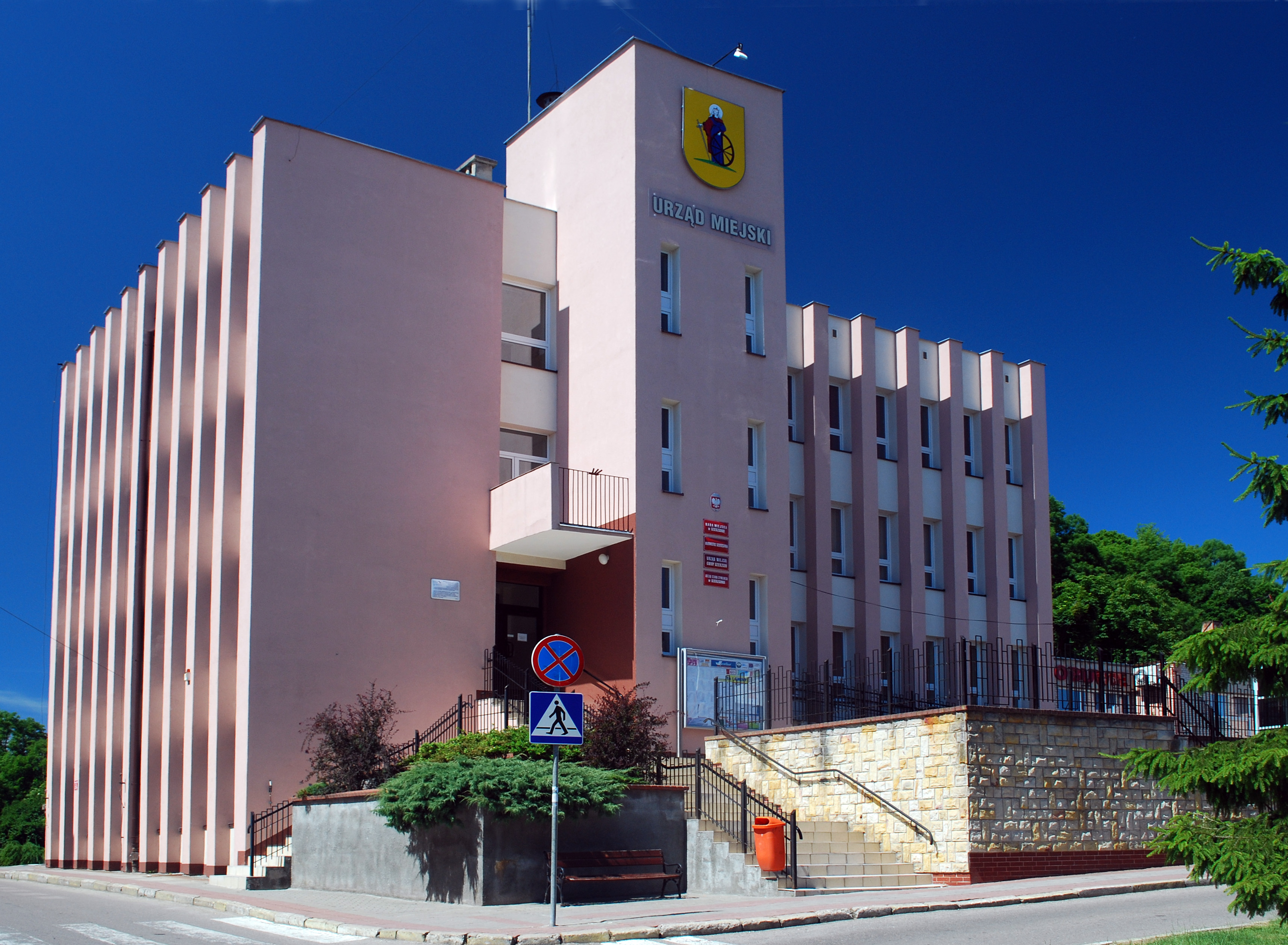 Urząd miejski w Dzierzgoniu.